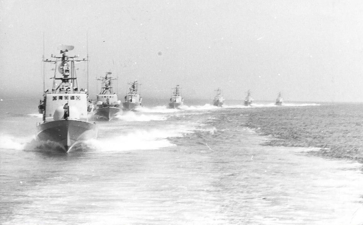 משט כבוד של ספינות השייטת בעת החלפת פיקוד